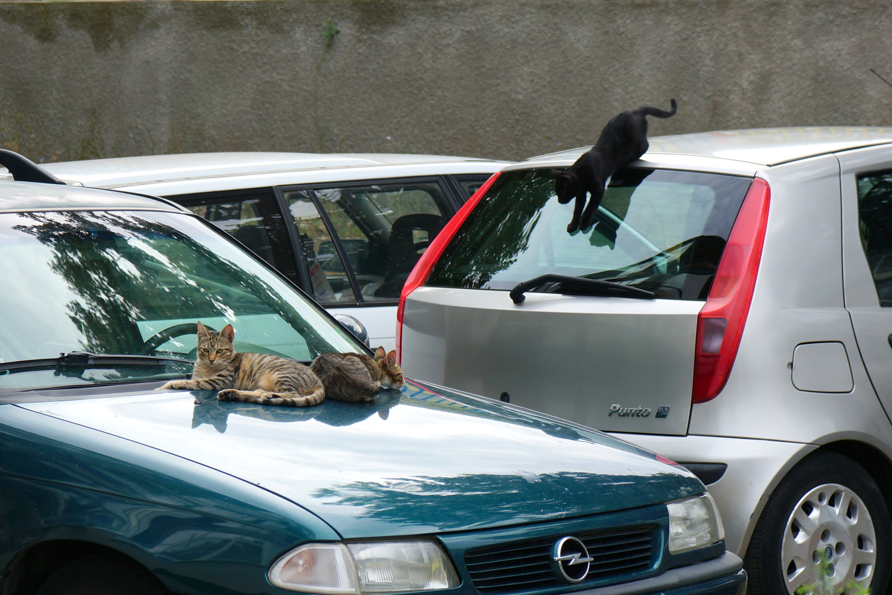 Odpoczywające koty w środowisku miejskim